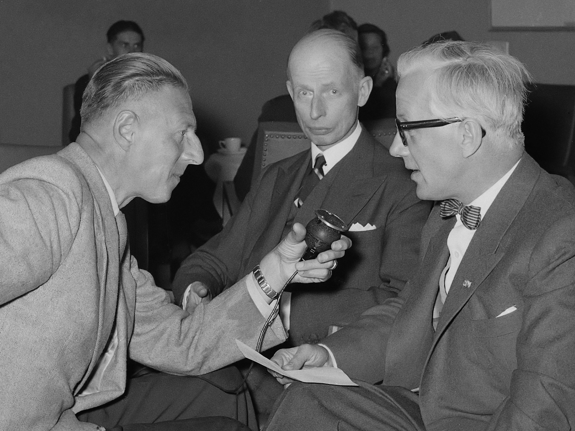 Guus Weitzel interviewt burgemeester d'Ailly 11 juni 1955